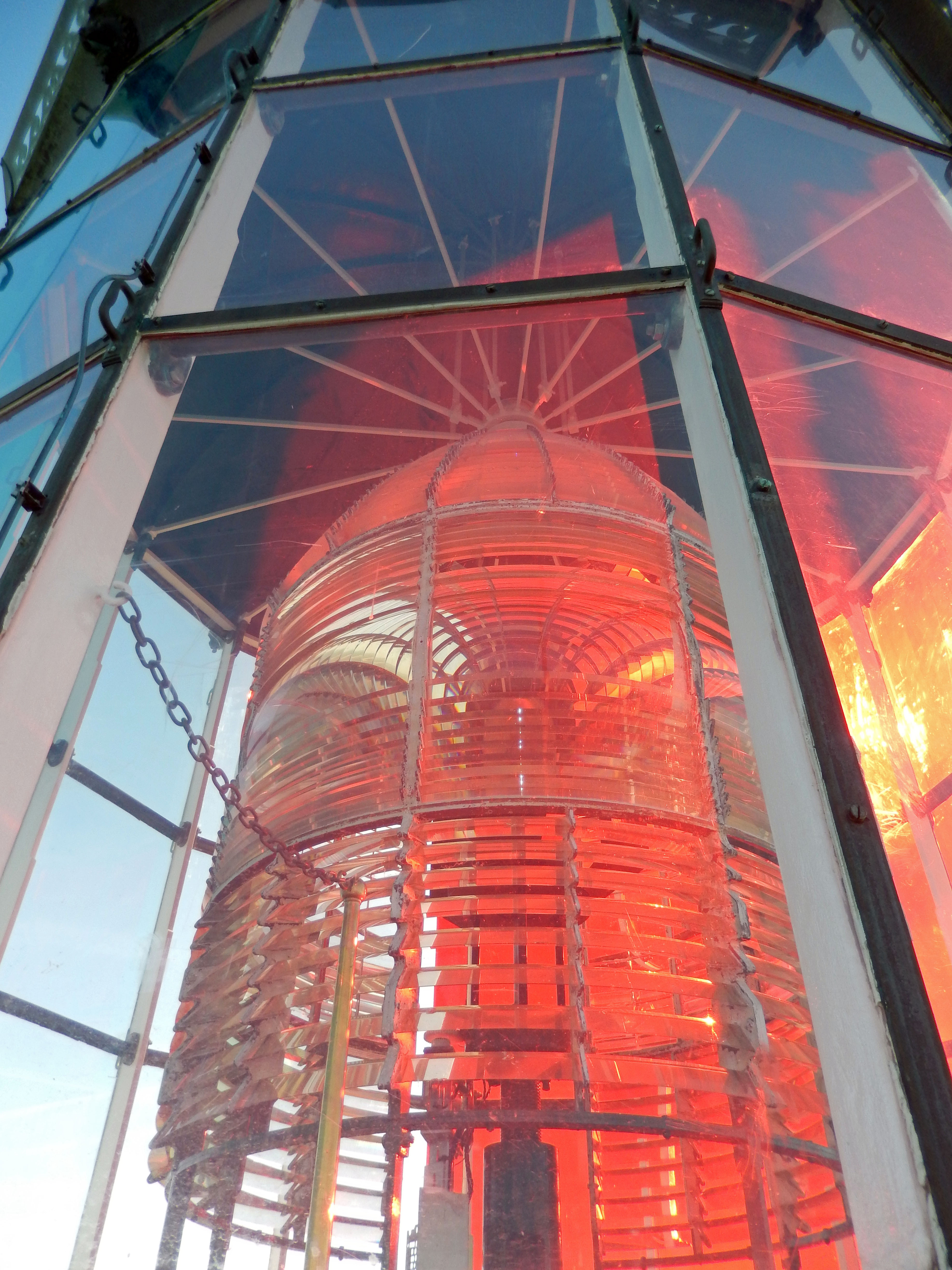 2014-09-27 Le Verdon, Gironde, phare de Cordouan